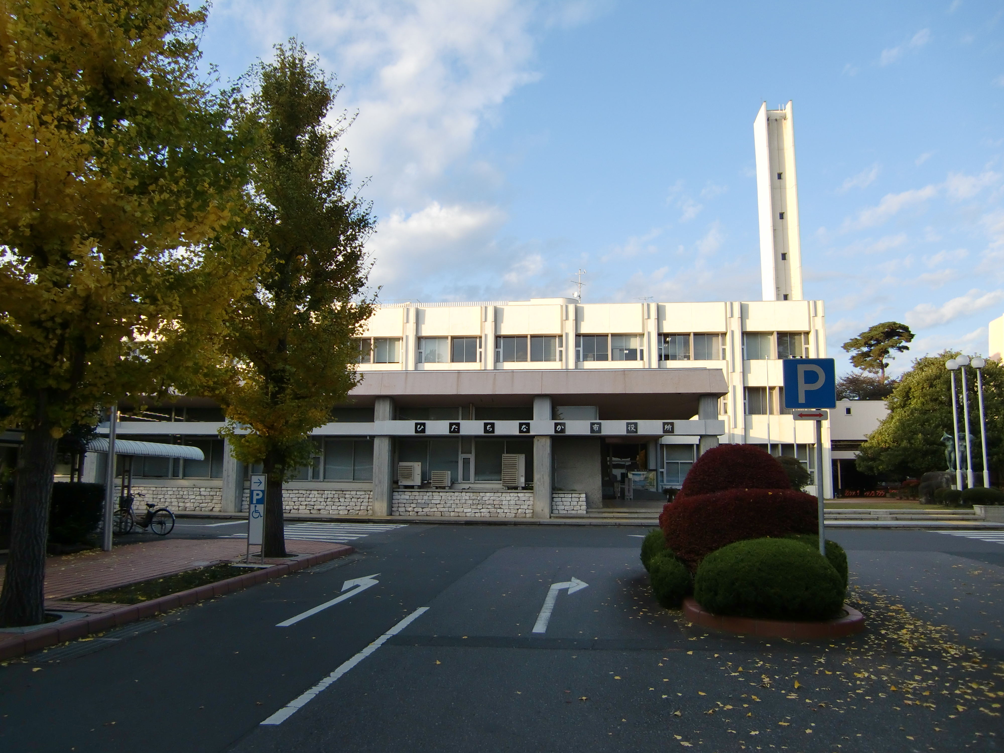 ひたちなか市役所庁舎